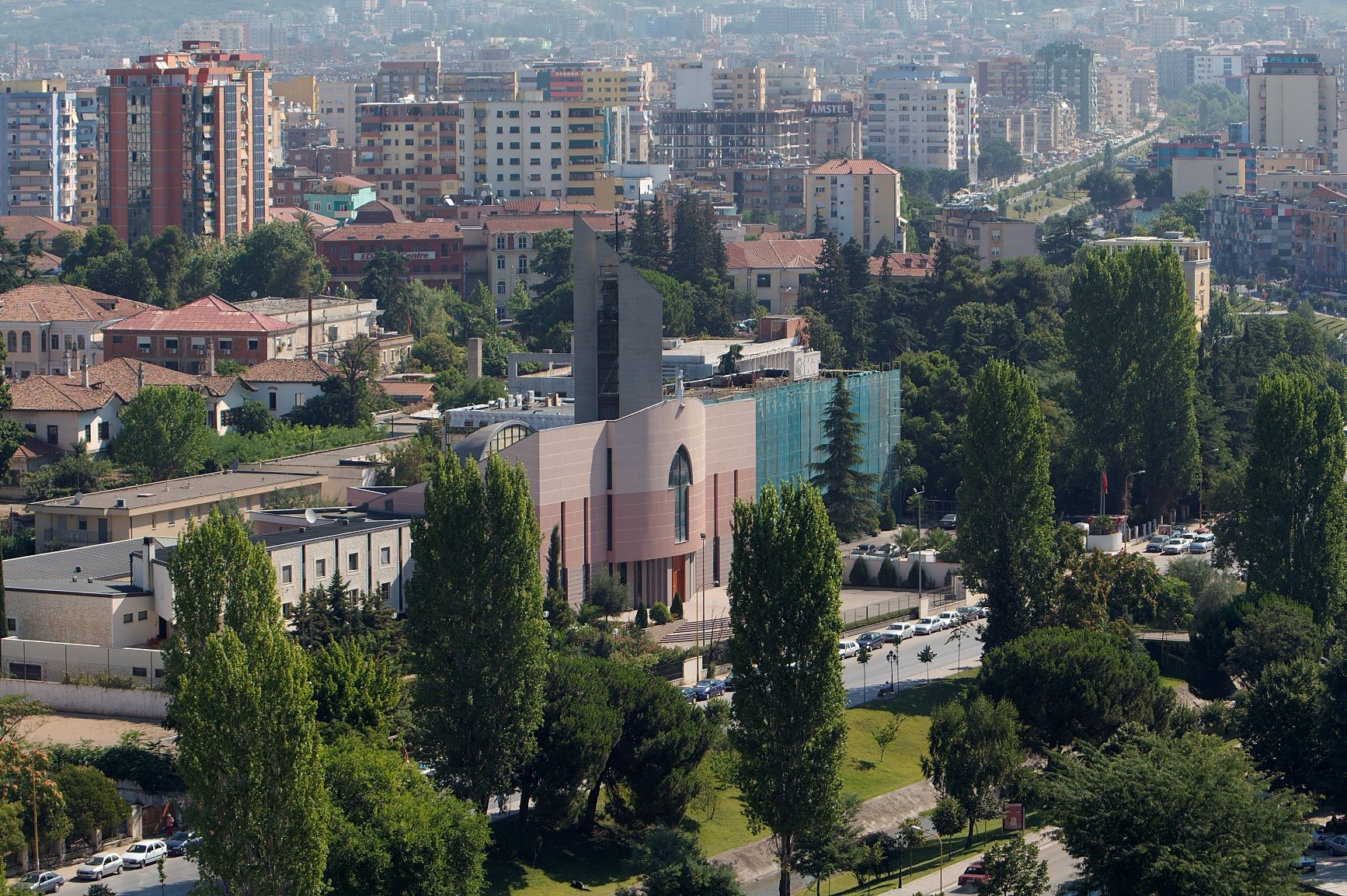 Taken in Tirana, Albania